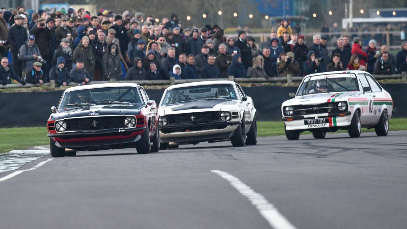 Аҧсшәа: Jefe Mustang en la Reunión de Miembros de Goodwood 2019